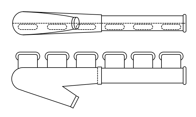 Avgasrekylator av saxofon typ.